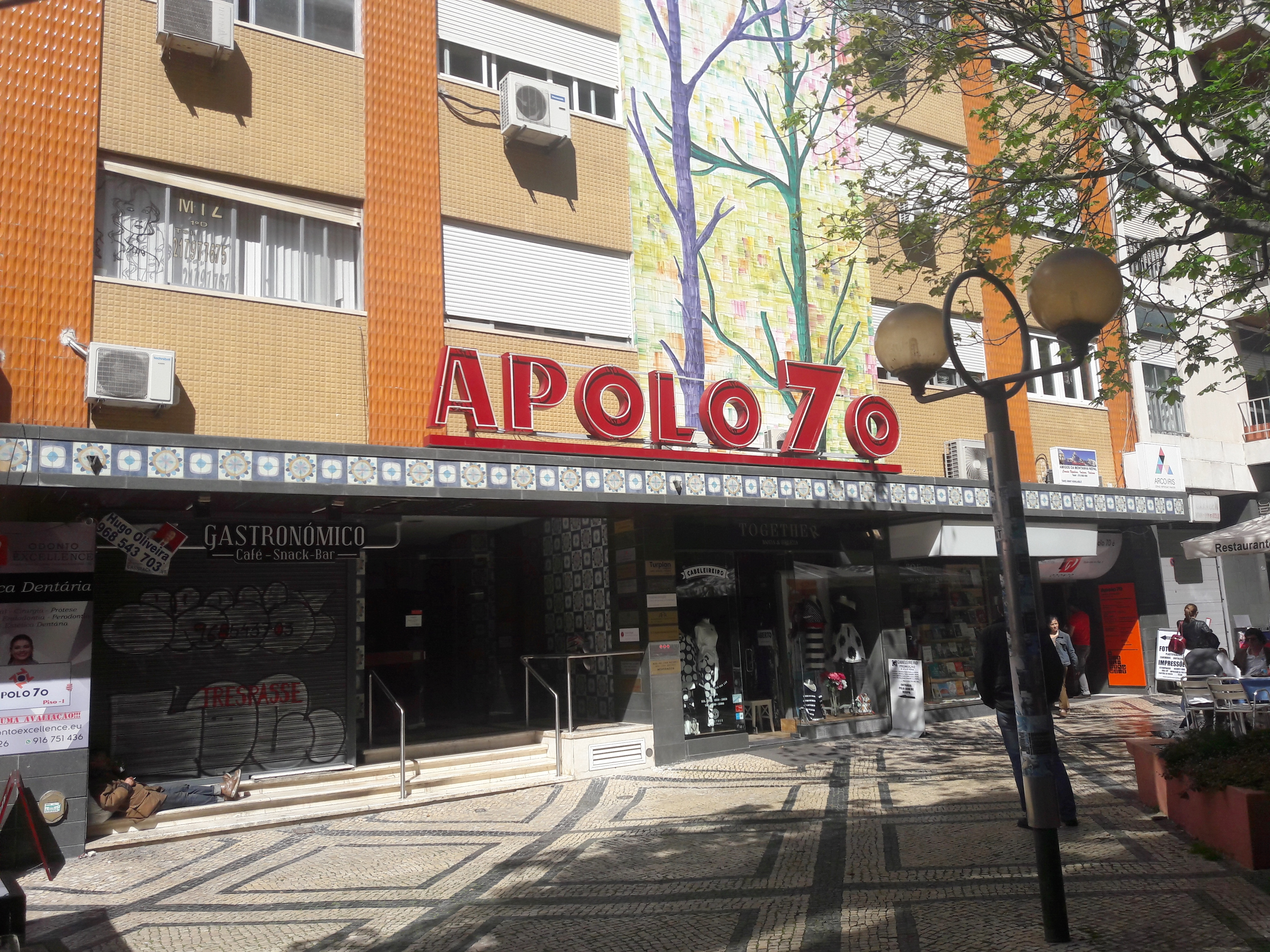 Centro Comercial Apolo 70, no Campo Pequeno, em Lisboa